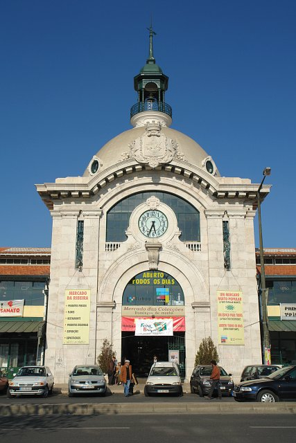 Mercado da Ribeira, São Paulo, Lisboa, Portugal